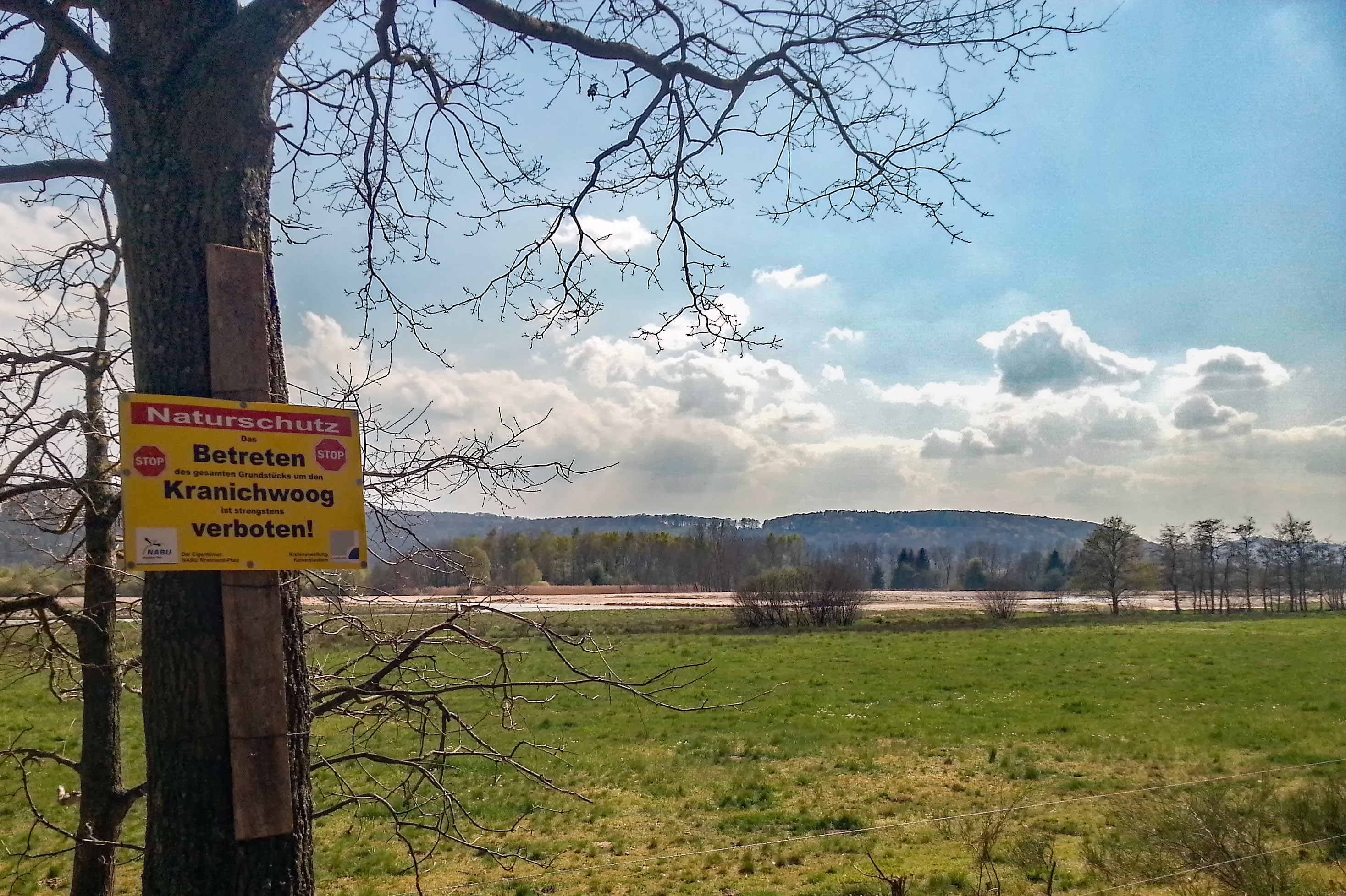 Warnschild am Naturschutzprojekt Kranichwoog